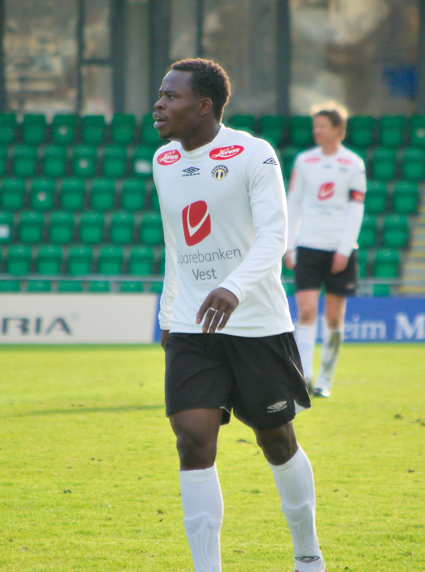 Barry Kader